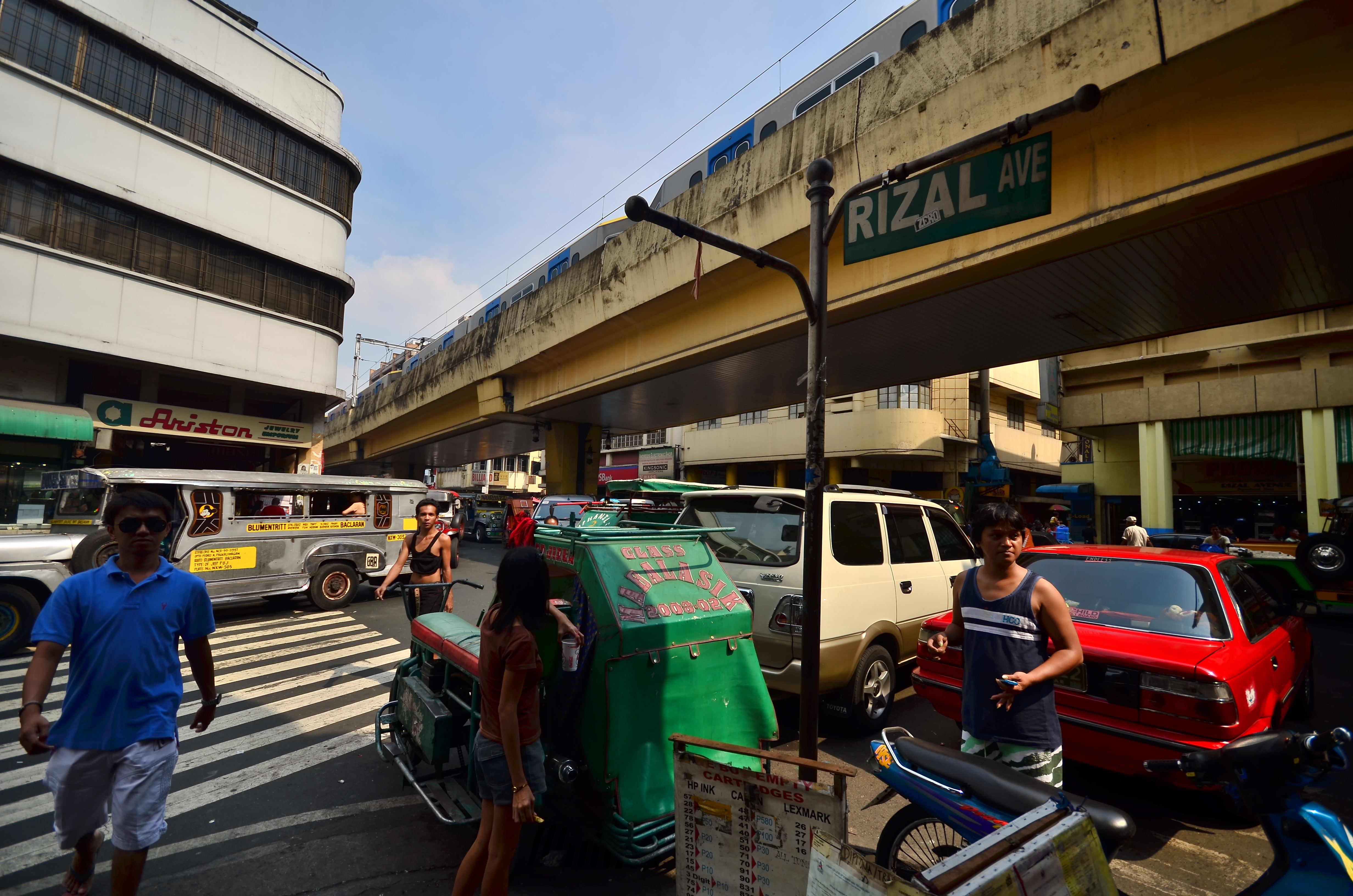 An angle of Rizal Avenue in Manila, Philippines